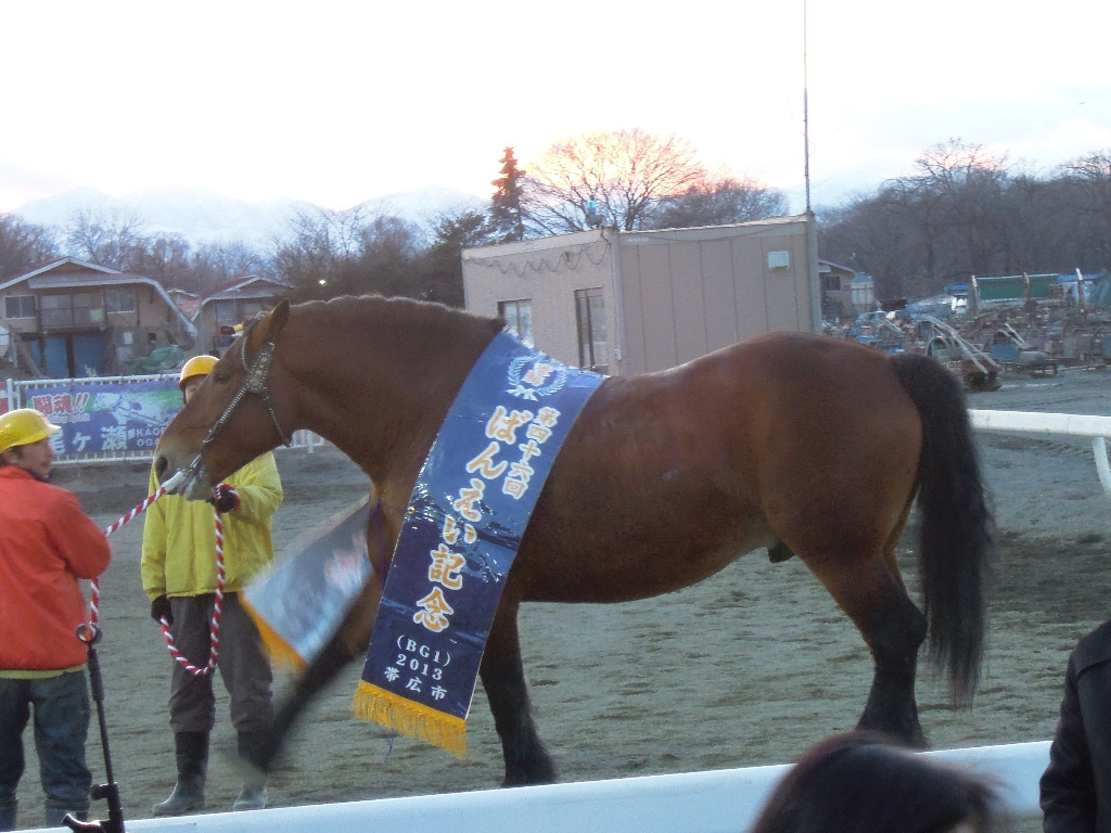 第46回ばんえい記念表彰式 インフィニティー号